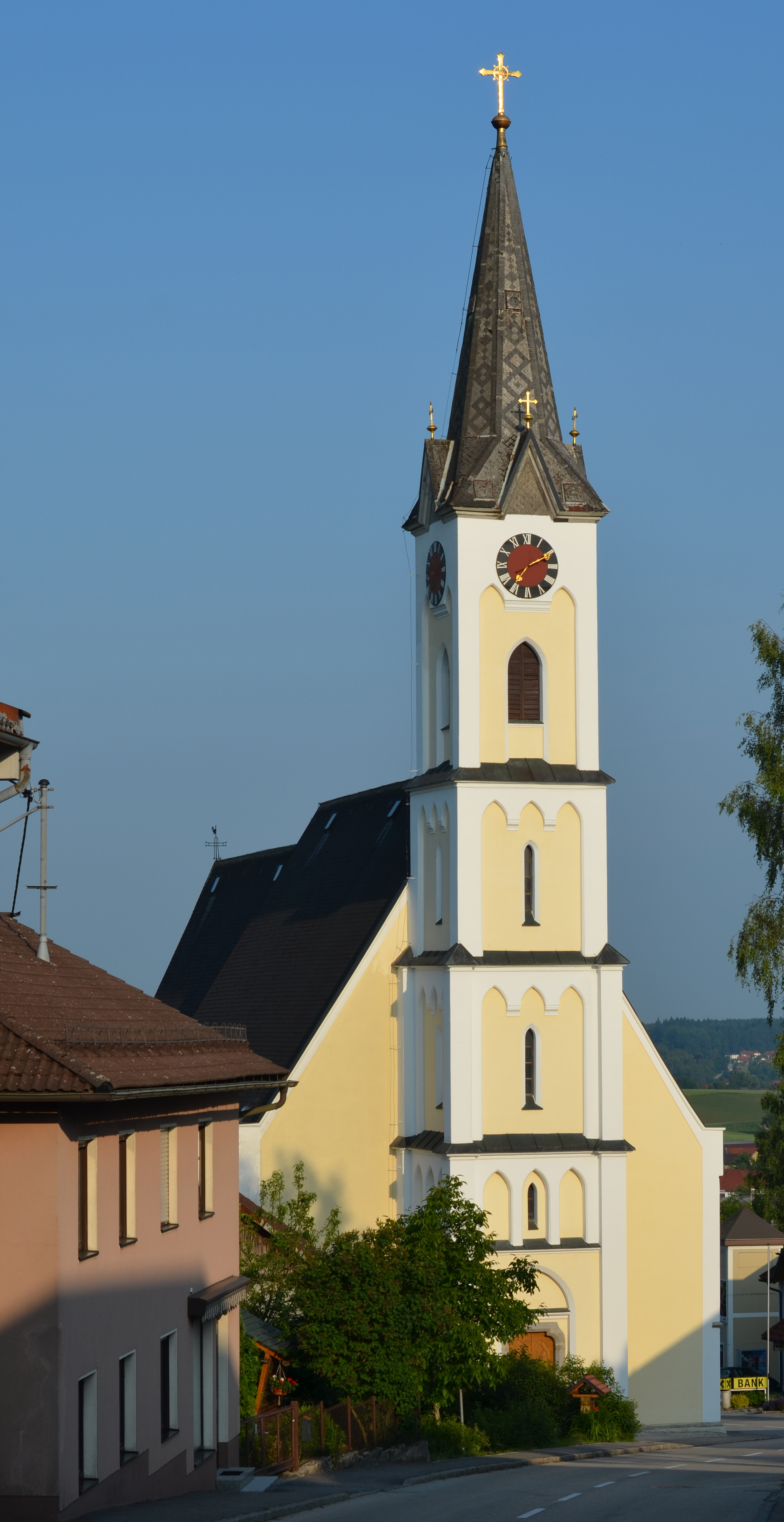 Kath. Pfarrkirche Hl. Dreifaltigkeit